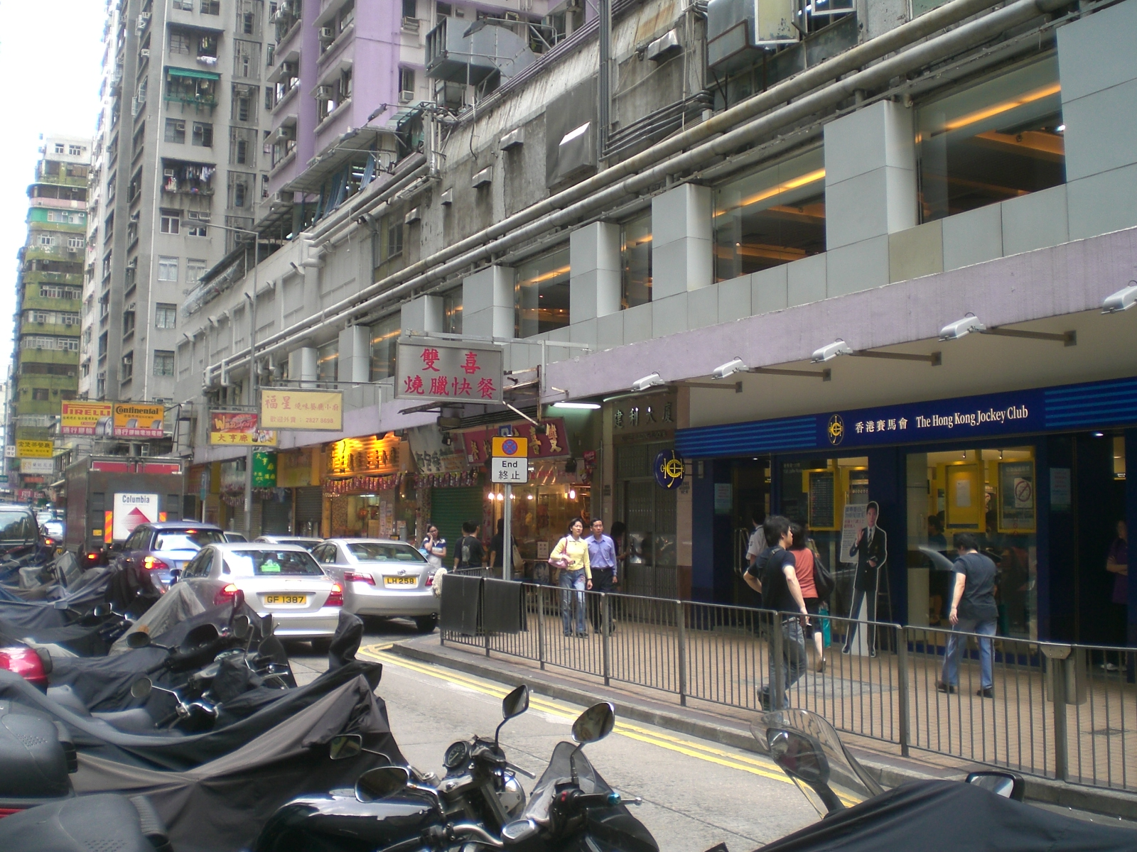 灣仔謝斐道香港賽馬會場外投注處